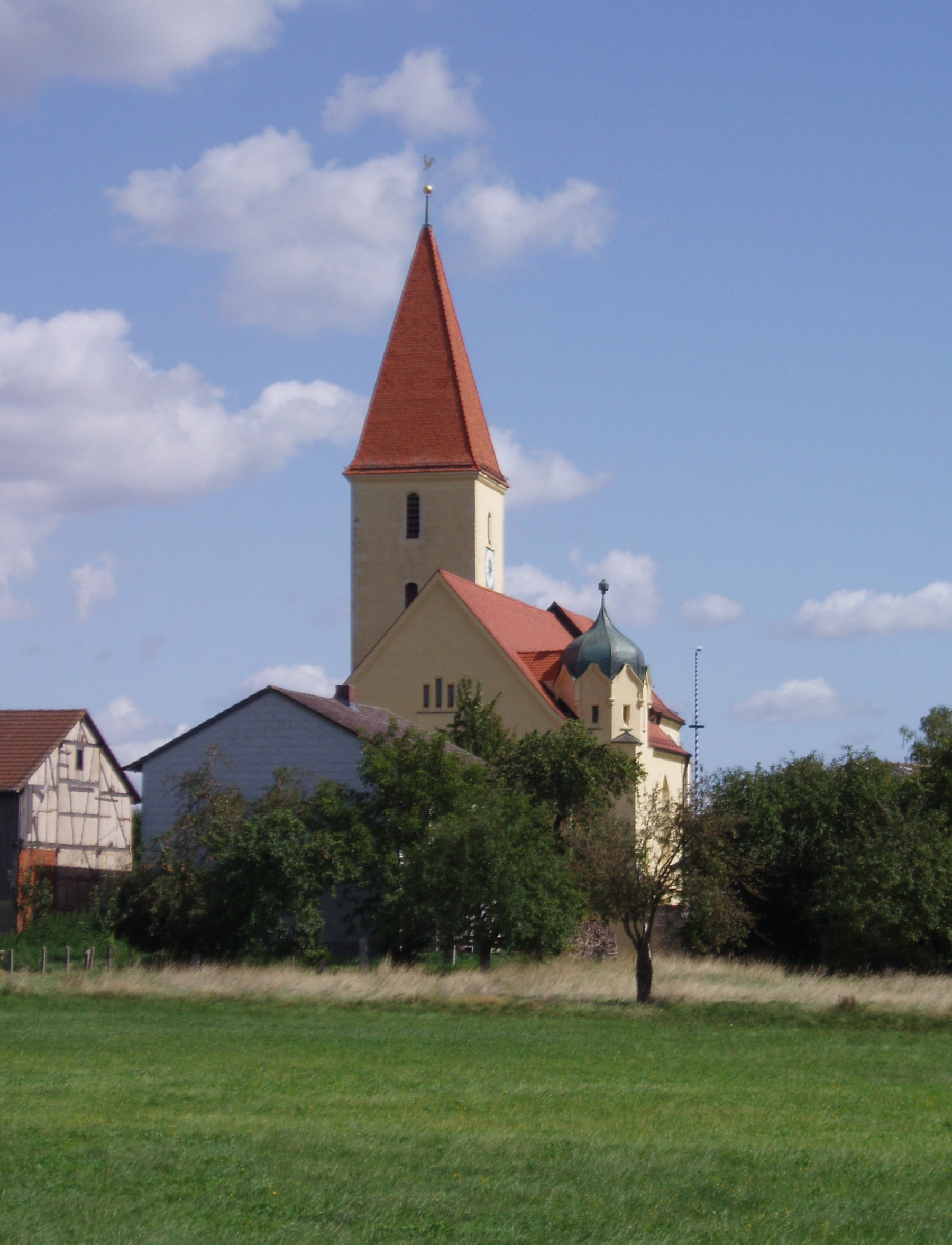 Pfarrkirche St. Sixtus in Pollenfeld (Landkreis Eichstätt), aus westlicher Sicht